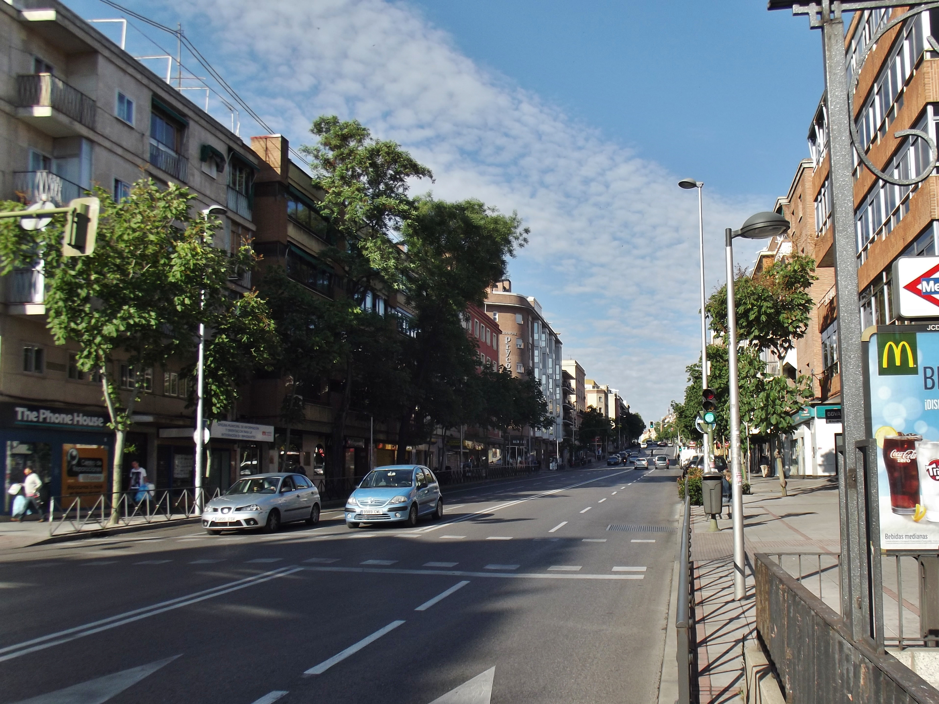 Vista de la calle General Ricardos, Madrid.